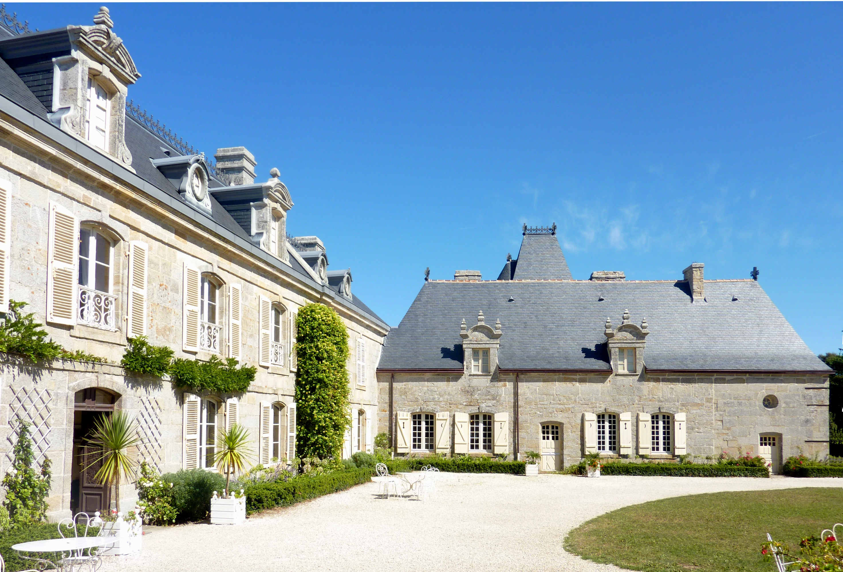 manoir de Kerazan vu de l'ouest; Loctudy